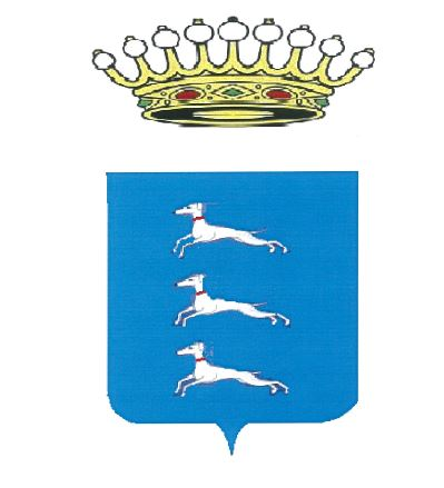 sola cordis nobilitate